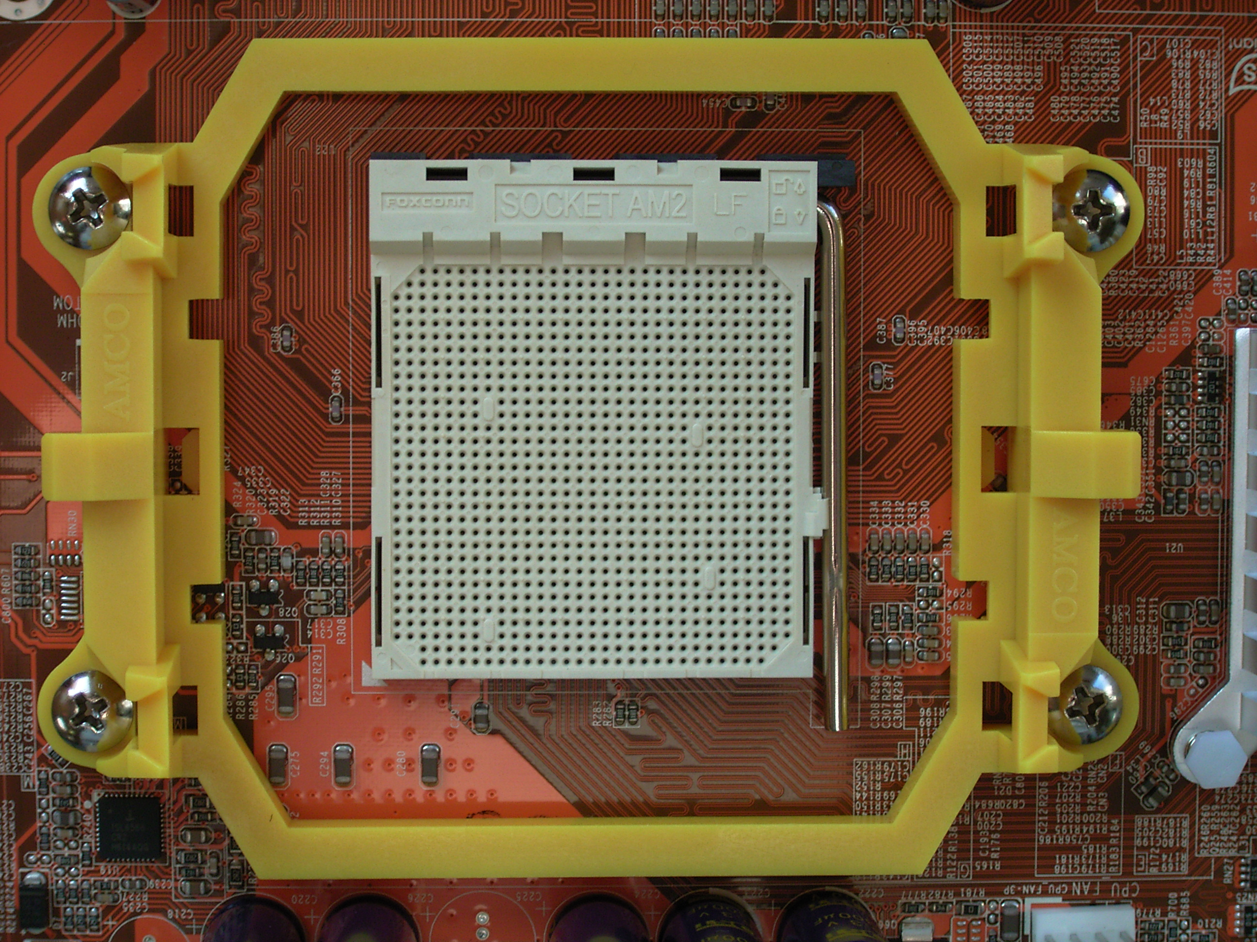 Sockel AM2 mit Retention Module. Fassung für AMD-Microprozessoren